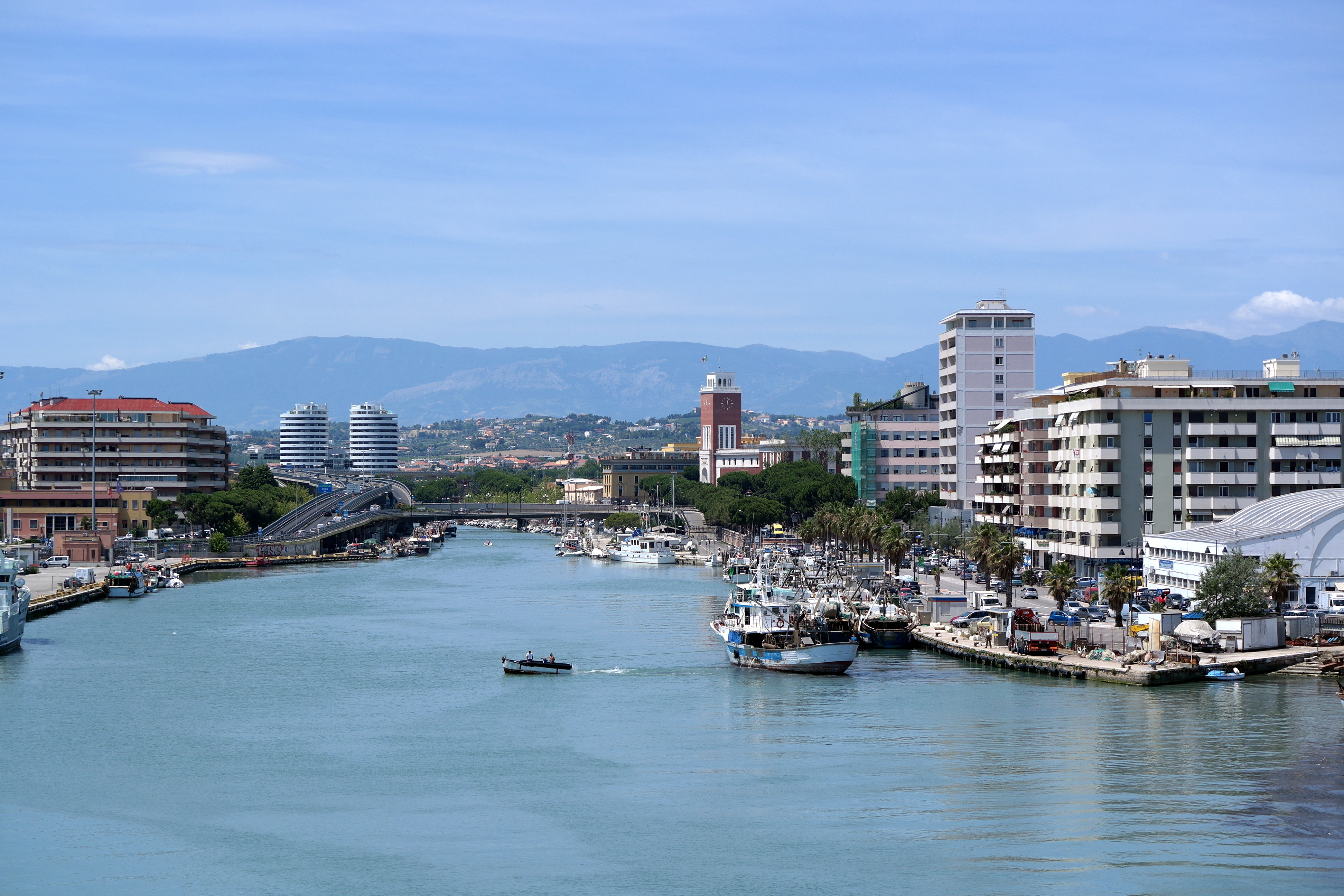 Foce del fiume Pescara dal ponte del mare